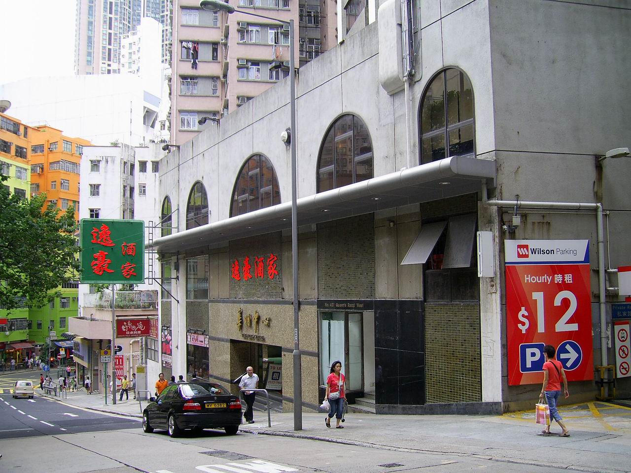 中文（香港）: 華明中心